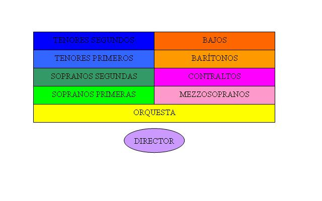 Distribución habitual de masa coral